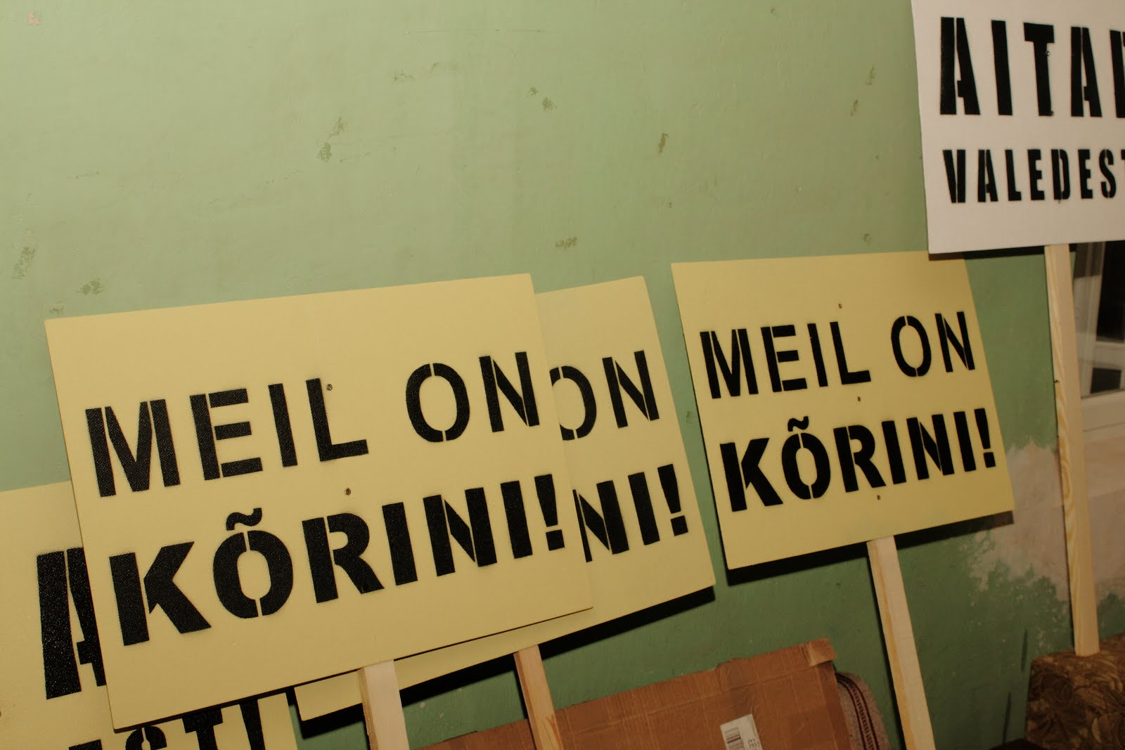 Plakatid kirjadega "Meil on kõrini" ja "Aitab valedest!", valmistatud meeleavalduseks 13. novembril 2012.